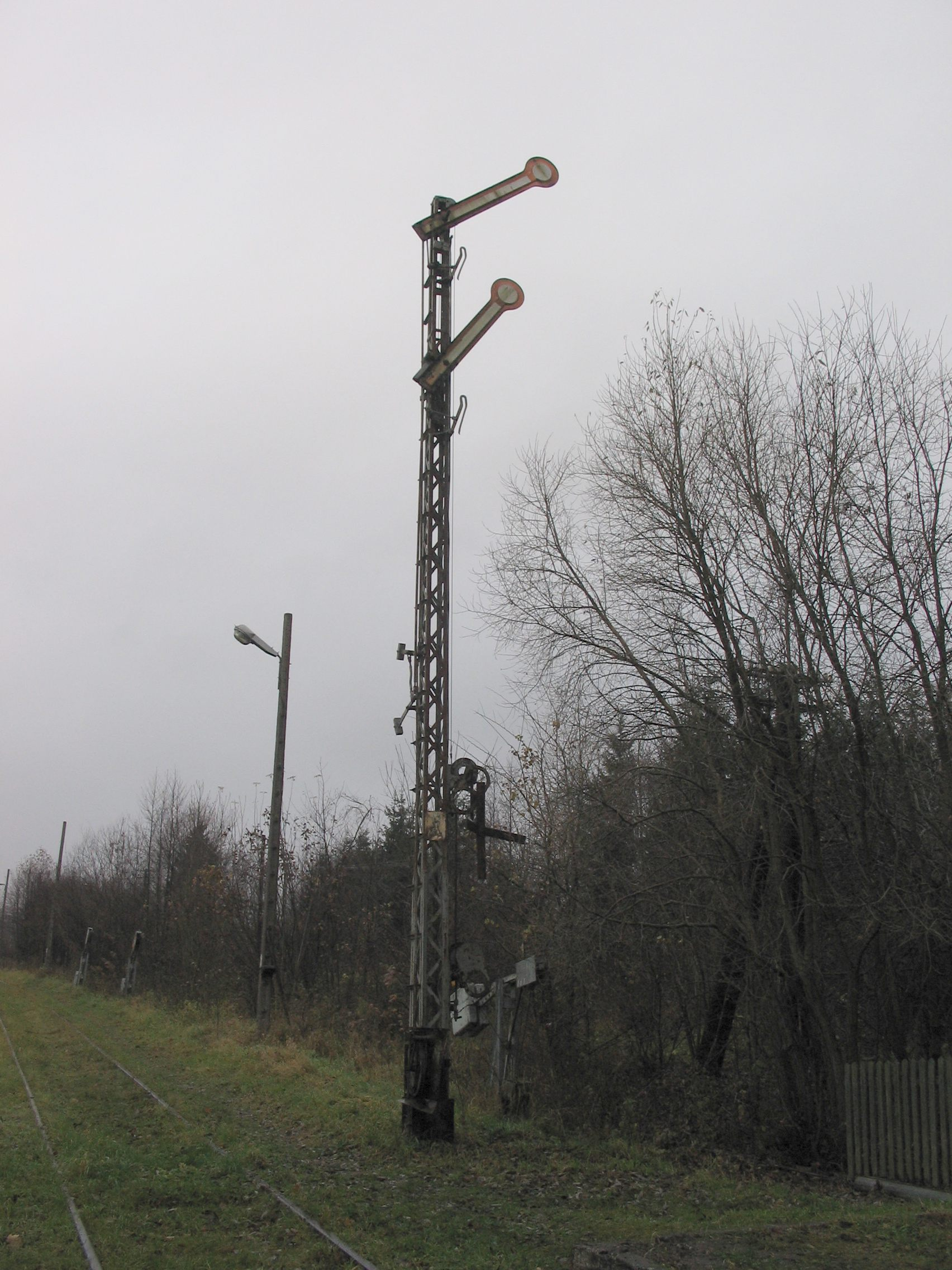 Dawny semafor wjazdowy A1/2 stacji Białowieża Towarowa, obecnie semafor wyjazdowy z toru nr 2 - pokazuje sygnał Sr3 "wolna droga ze zmniejszoną prędkością".